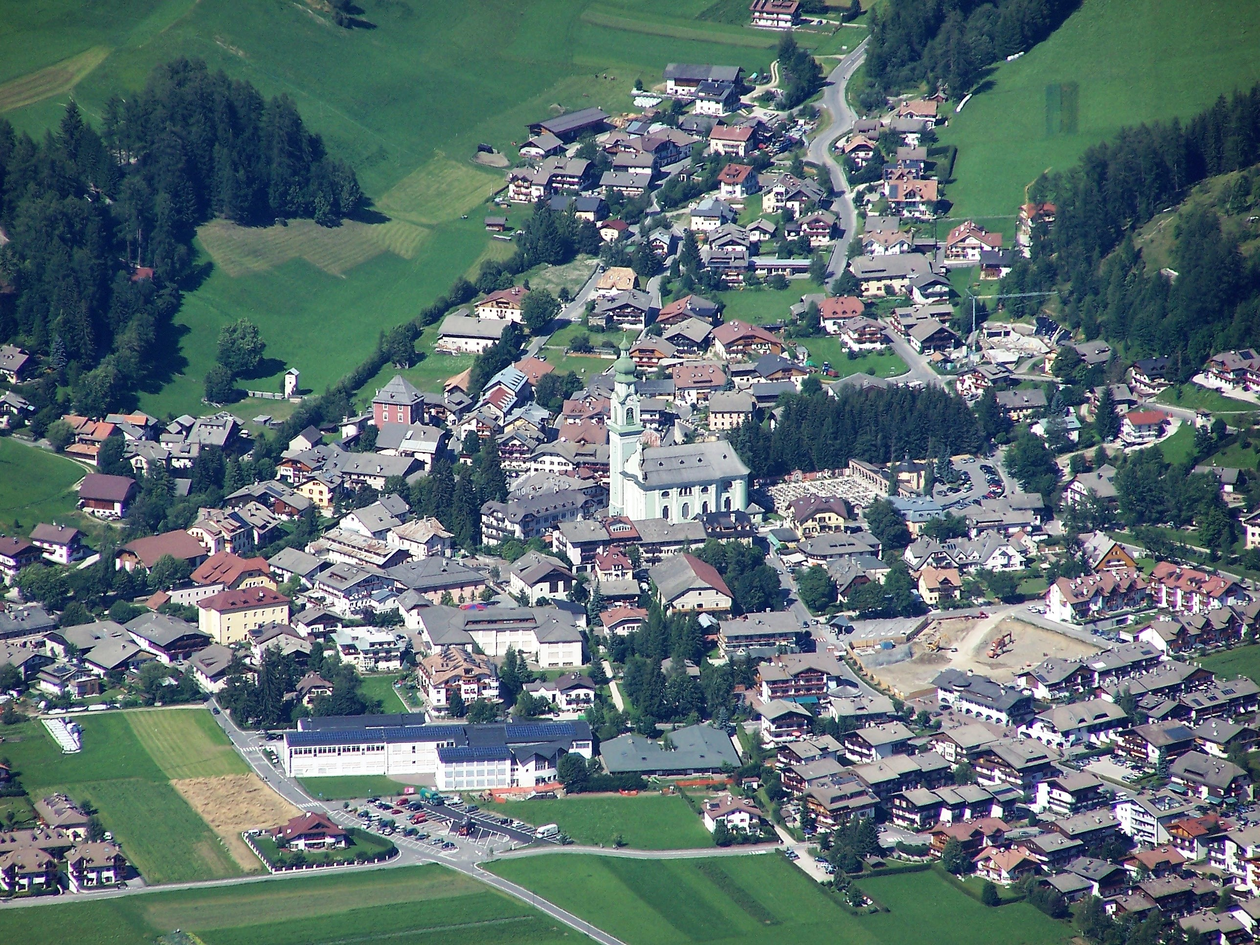 Toblach in den Dolomiten, vom Sarlkofel aus fotografiert